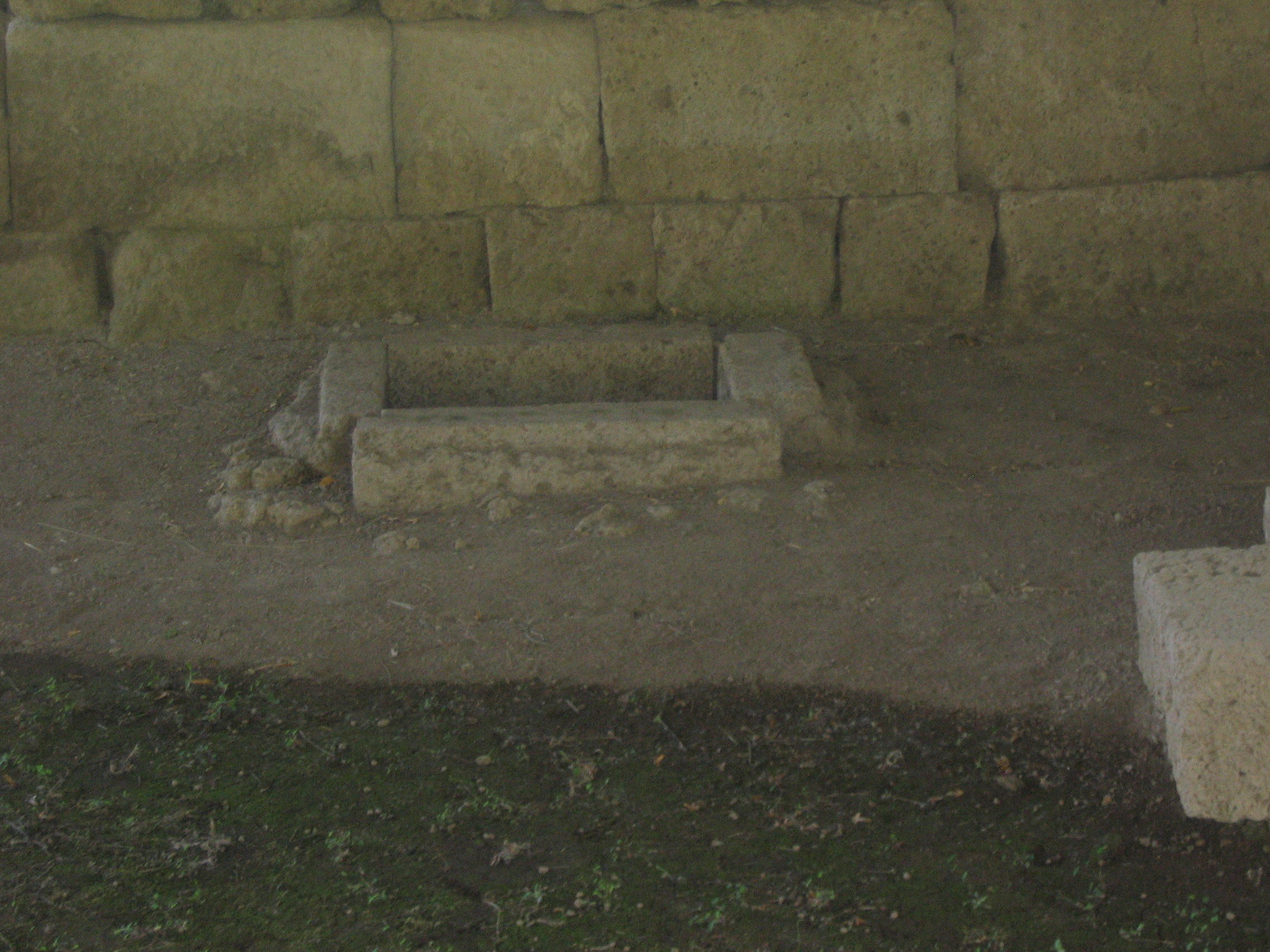 Narce, Valle della Treja, Lazio, Italia